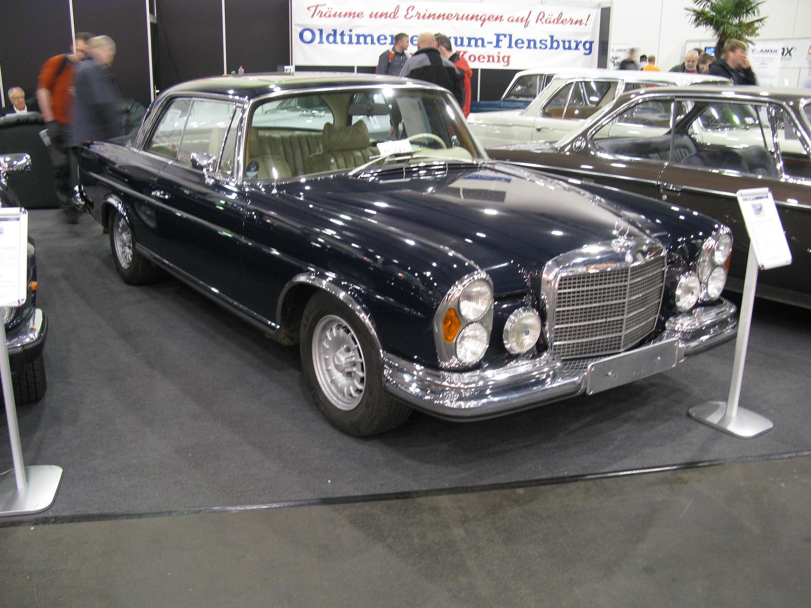 Mercedes-Benz 280 SE 3.5 Coupe